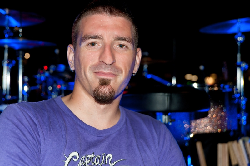 Aerodrom Damir Medić